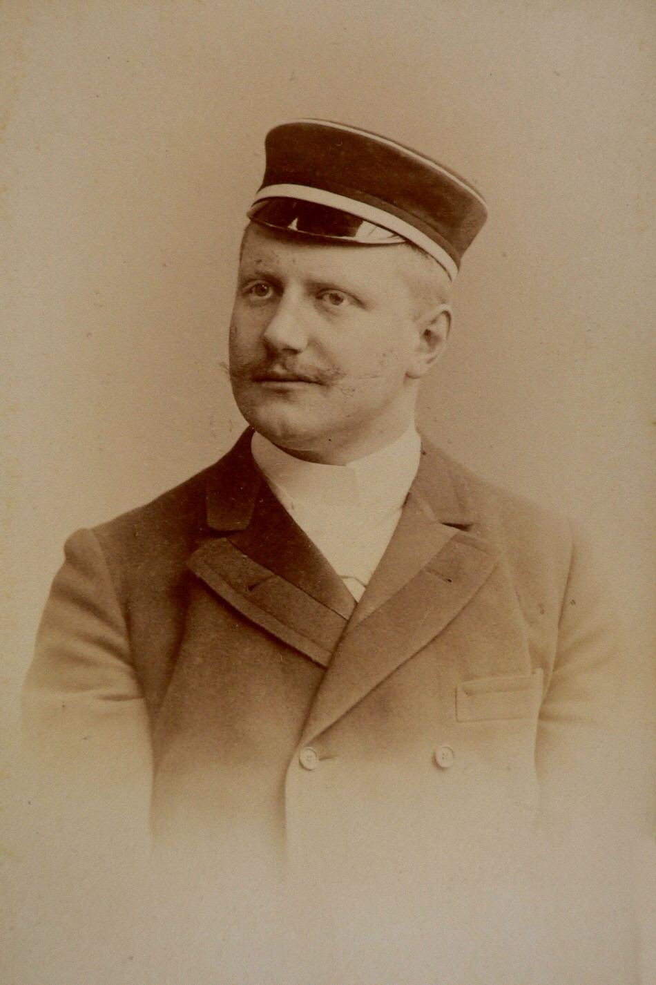 Porträtfotografie des späteren Gynäkologen Hans Schröder